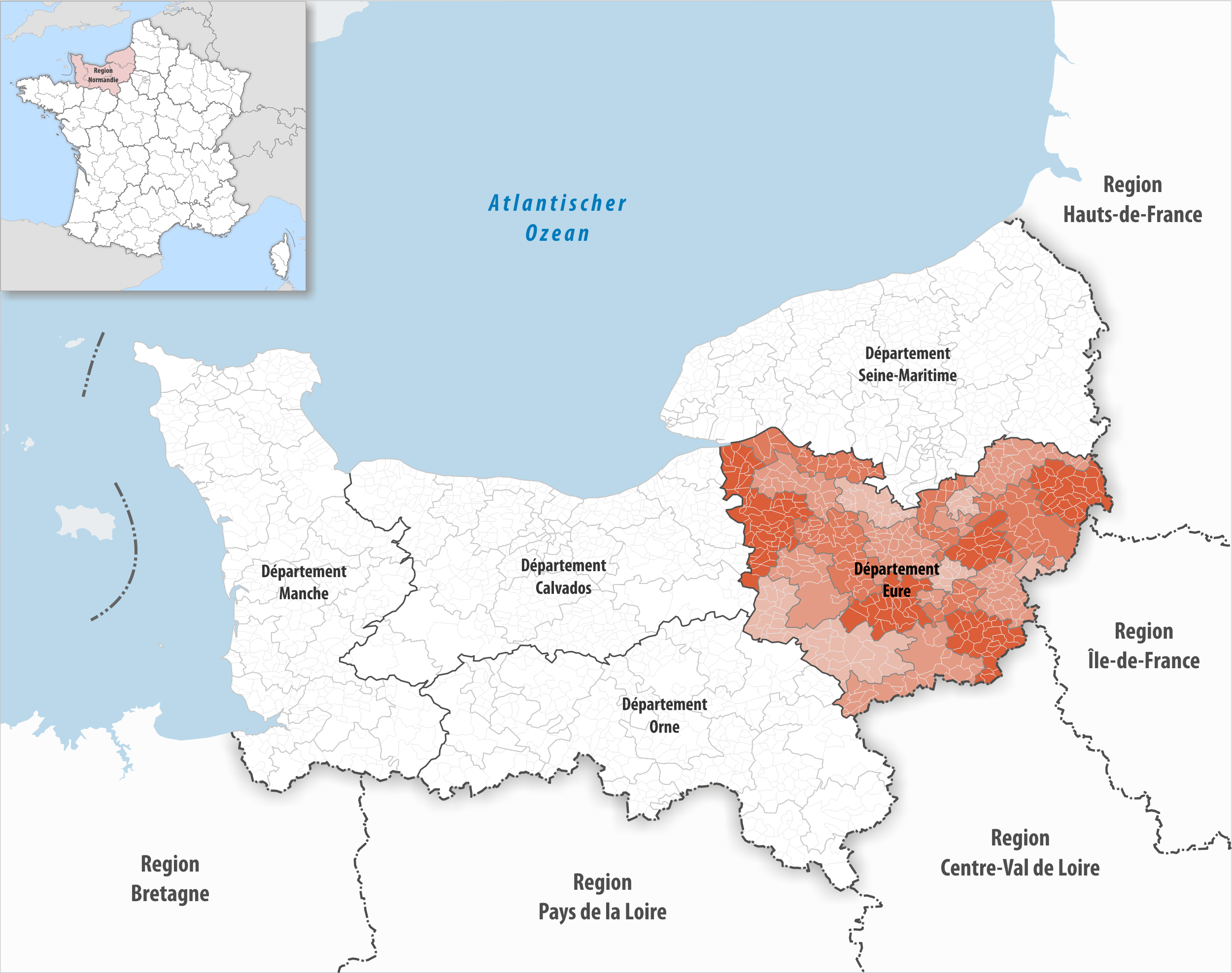 Lage des Departements Eure